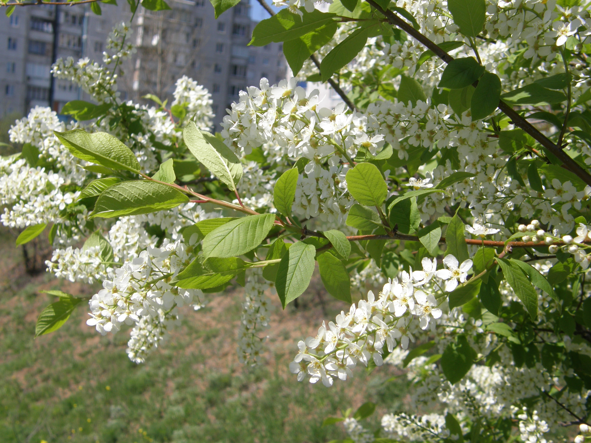 Растение в Донецке.